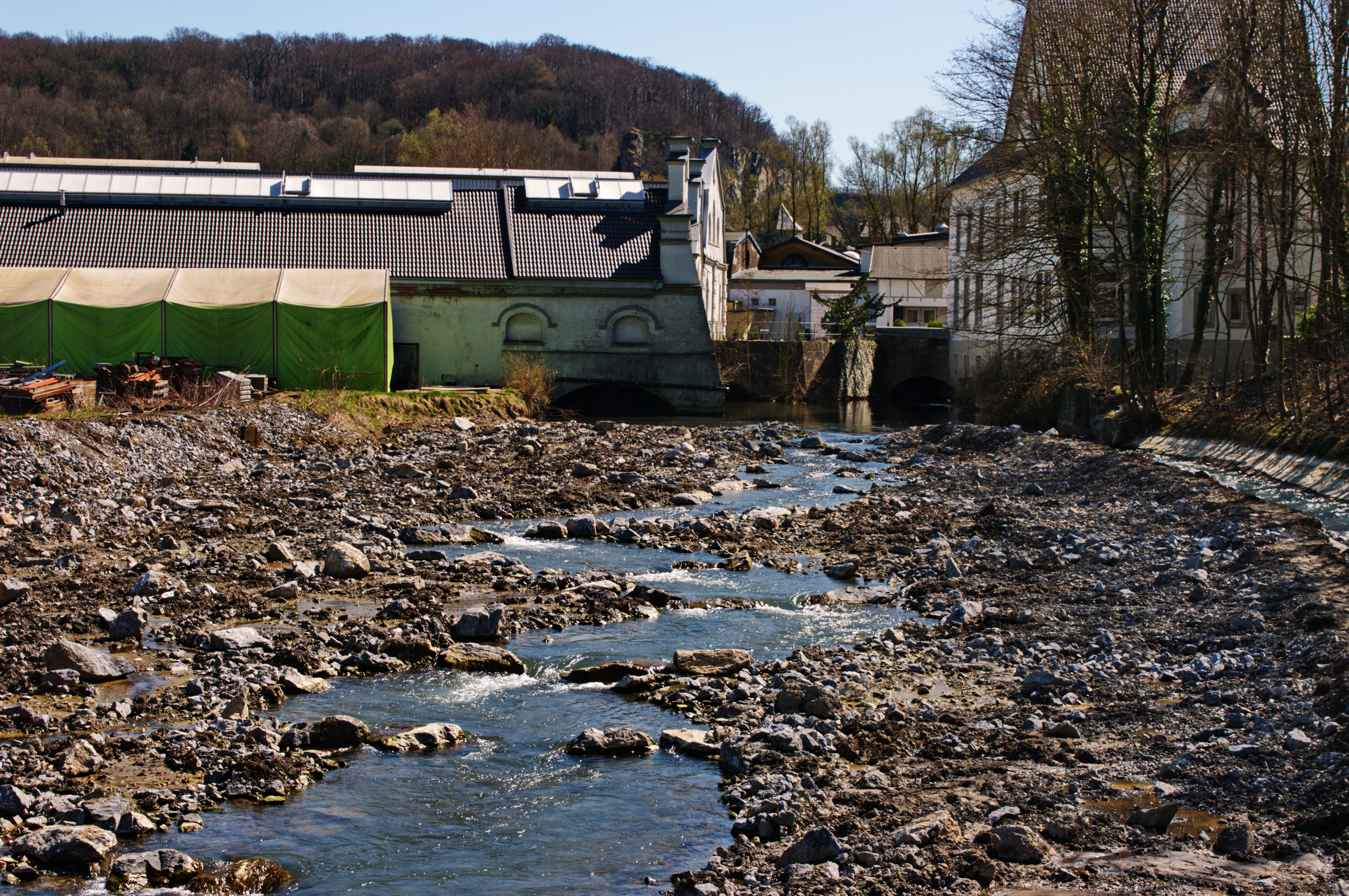 Die Wester (Warstein) während der Renaturierungsarbeiten im April 2010. Blick nach Süden, auf die Durchlässe unter der Firma Jongeblood